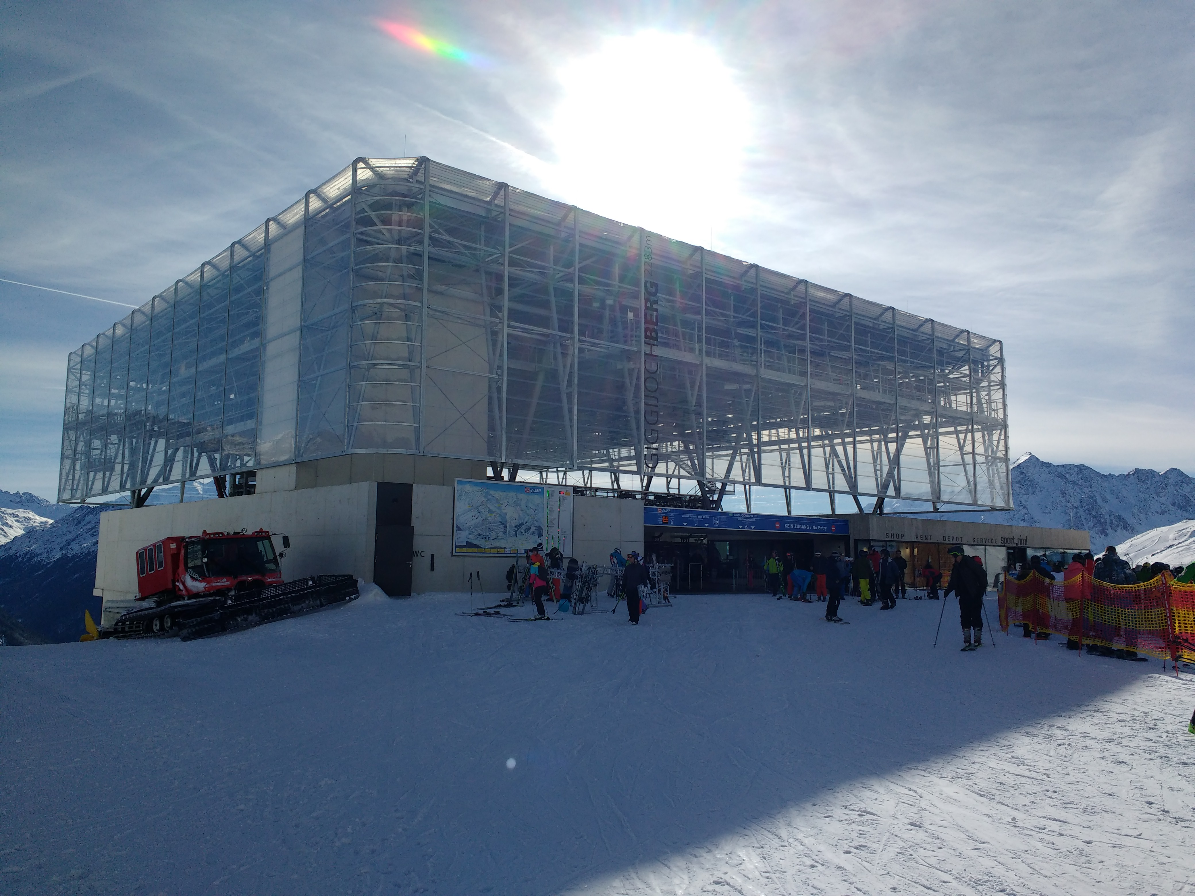 Bergstation der neuen Giggijochbahn, Bj. 2016